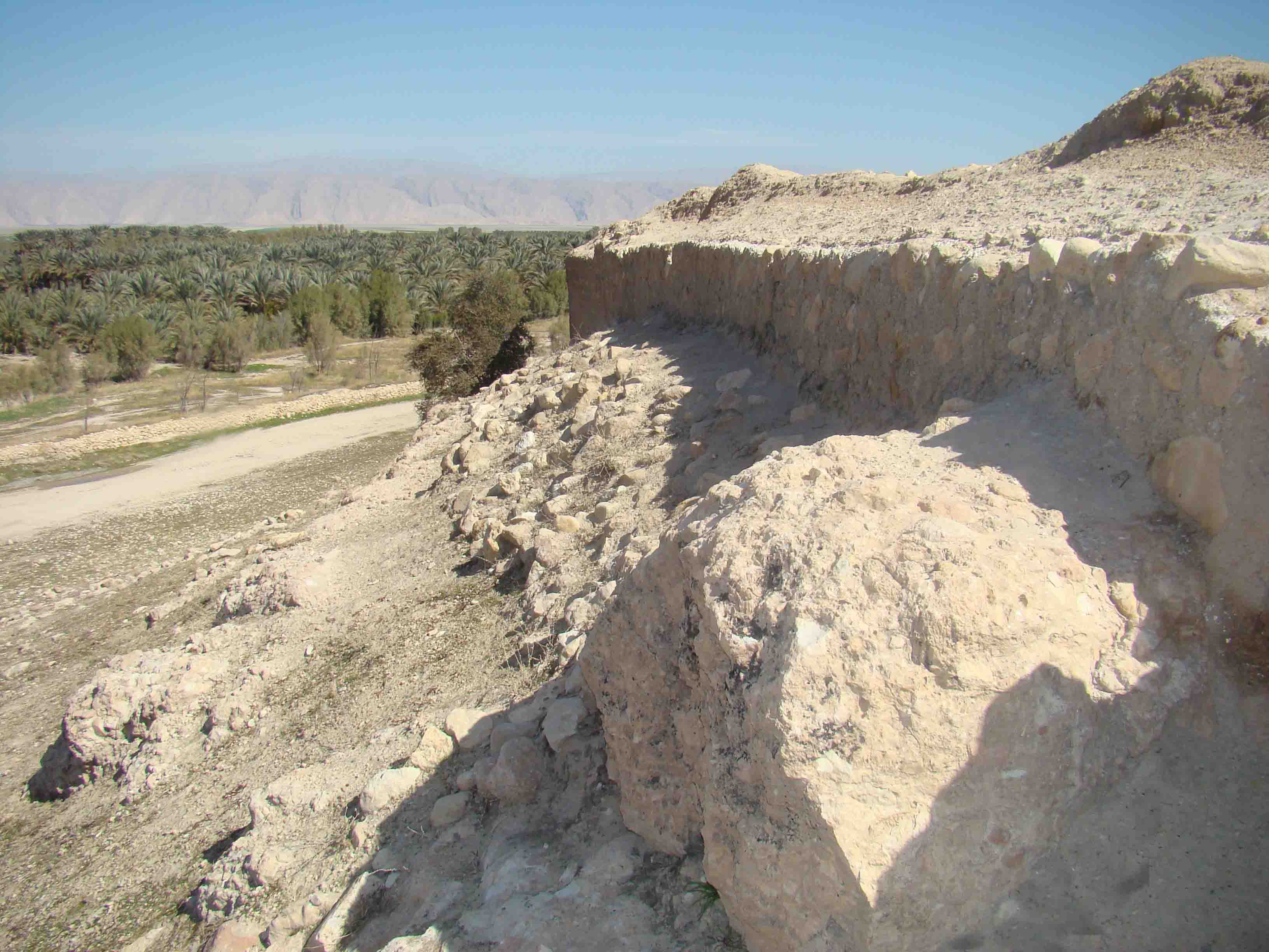 آتشکده اذرفرنبغ کاريان